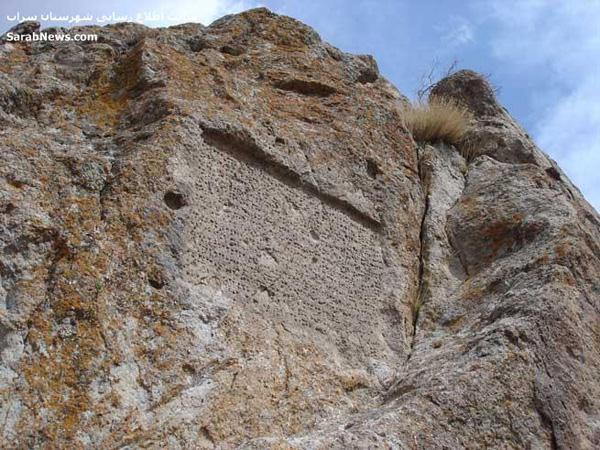 اورارتوها که به اعتقاد بسیاری از محققان، نیاکان ترکان آذربایجان و گرجی‌ها بوده‌اند، با مادها در ایران مراوده و البته مجادله‌های بسیاری داشتند و پادشاهان آنها نیز مانند آنچه در آن روزگار متداول بود پس از پیروزی‌های بزرگشان دستور به کندن و نگارش کتیبه و ثبت پیروزی‌های تاریخی‌شان می‌کردند. سنگ‌نوشته رازلیق یکی از همین اسناد ارزشمند است که به خواست آرگیشتی دوم (730 ـ 685 ق.م.) پادشاه صاحب نام اورارتو، پس از پیروزی بر همسایگانش و تسخیر بخش‌های زیادی از سرزمین‌های آنان به نگارش درآمد. شكوه استقامت اورارتو آنچه از میان سطرهای این کتیبه که به خط میخی اورارتویی نوشته شده و می‌توان ترجمه کرد به این شرح است. «به یاری خداوند، آرگیشتی می‌گوید: من به سرزمین آرهو لشكر كشیدم. سرزمین اولوشو و سرزمین بوقو را تسخیر كردم تا كنار رودخانه مونا رسیدم و از آنجا بازگشتم. سرزمین‌های گیردو، گیتوهانی و توایشیدو را تسخیر كردم. شهر روتومنی را گرفتم. سرزمین‌هایی را كه من تسخیر كردم تحت باج خود قرار دادم. این قلعه‌ها را كه من به زور گرفتم دوباره برقرار ساختم